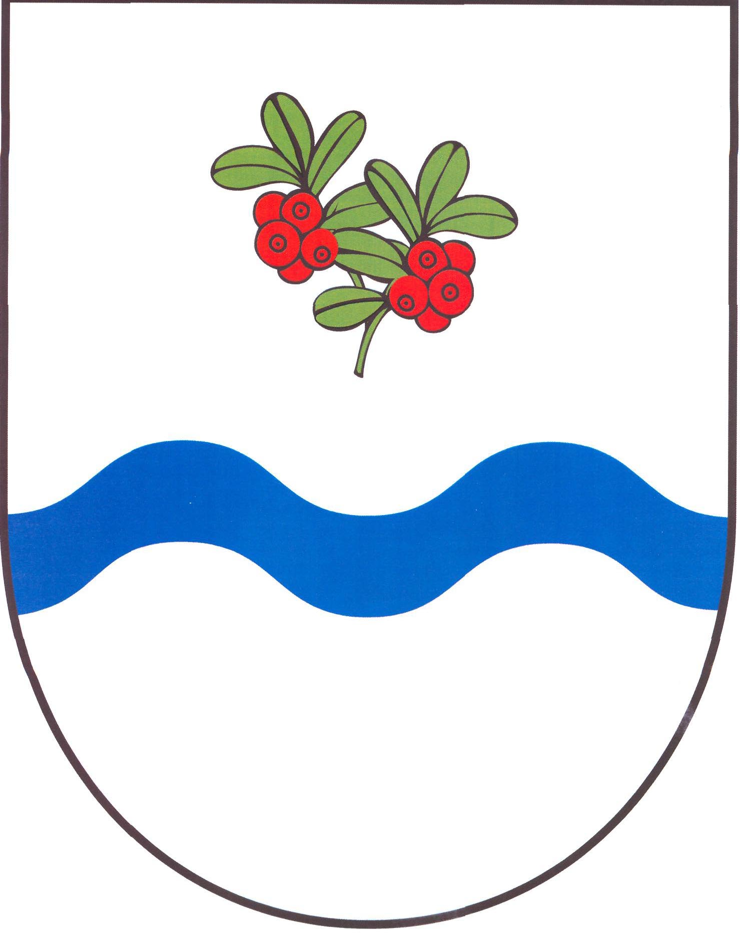 Česky: znak obce Dolní Brusnice